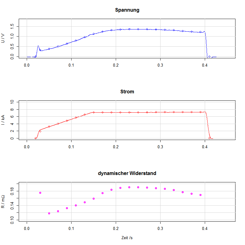 Dynamischer Widerstand einer Widerstandspunktschweißung mit Mittelfrequenz (Stahlblech)